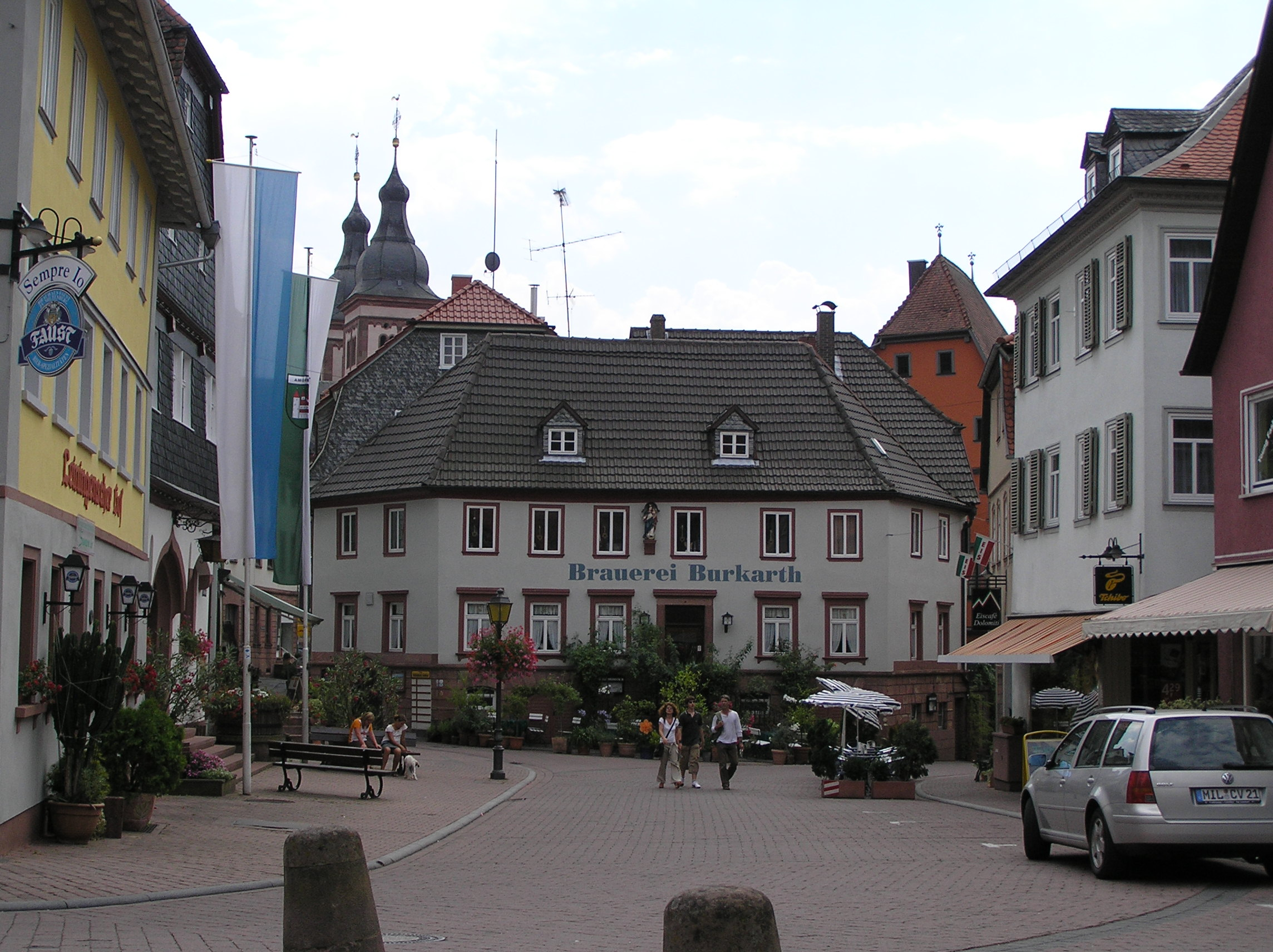 Der Amorbacher Marktplatz mit der Gaststätte Brauerei Burkardt (mitte), dem Rathaus (links) und der Abteikirche (im Hintergrund)